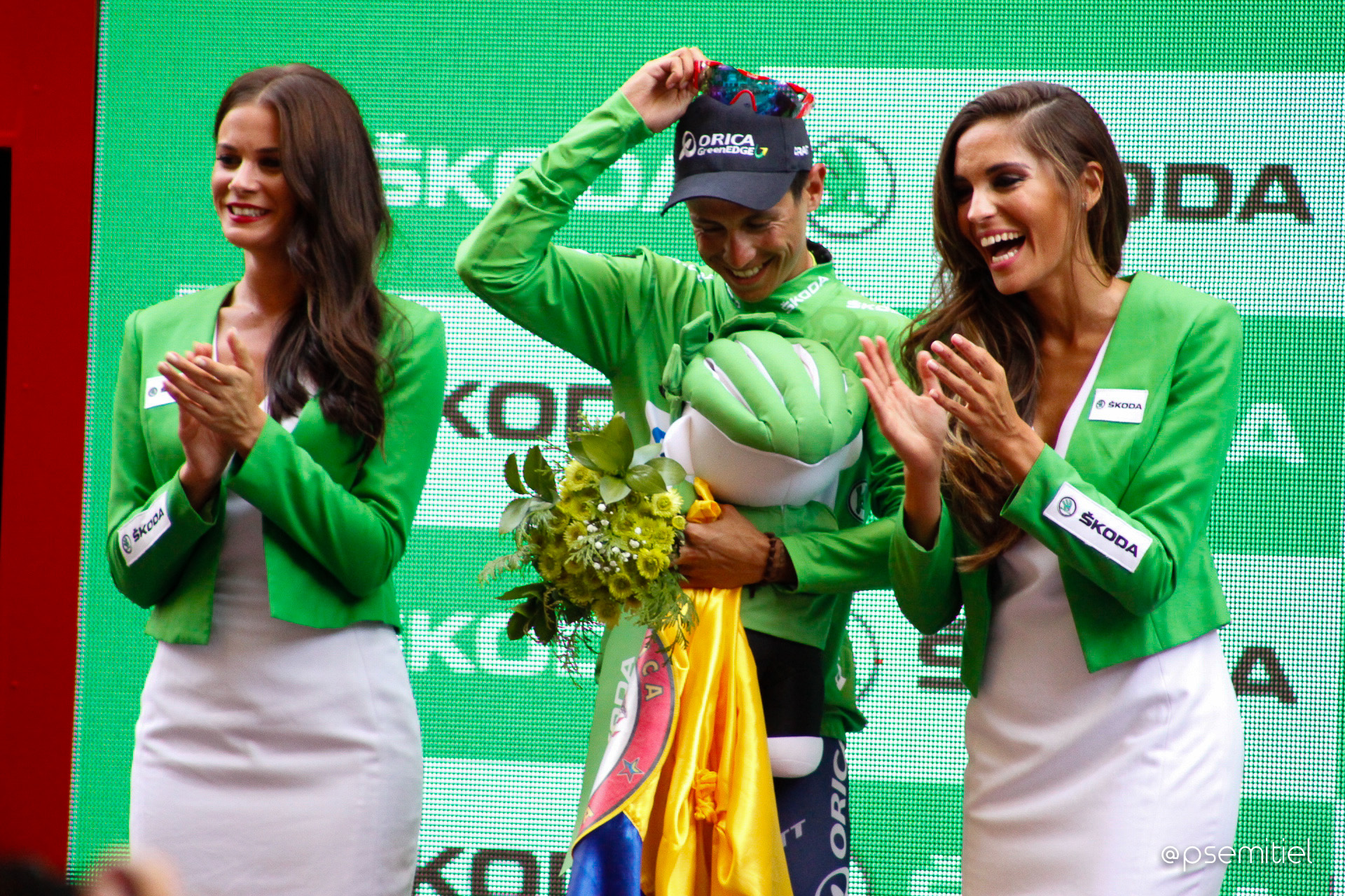 Vuelta a España 2015 | 8ª Etapa Puebla de Don Fadrique - Murcia-97